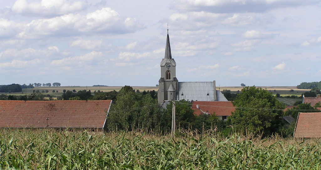 obec Křenovice (okres Přerov, Olomoucký kraj)